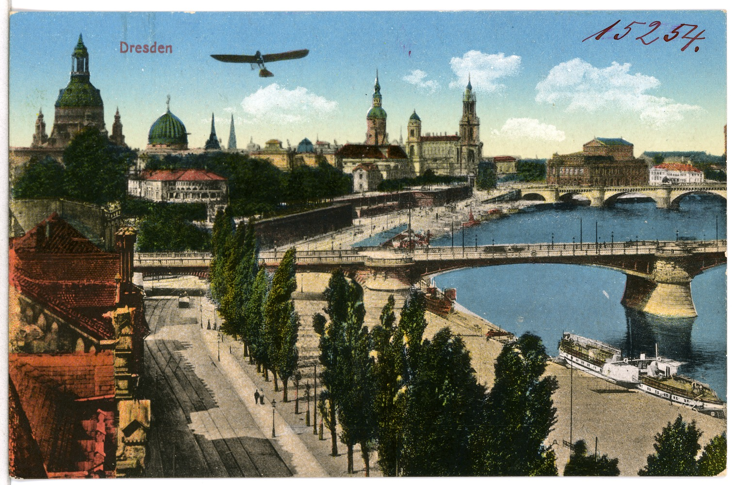 Dresden; Blick auf Dresden- Altstadt This postcard is from publisher Brück & Sohn in Meißen ( postcard has a unique number 15254 and is available in a higher resolution at the publisher. This images was uploaded in a cooperation project between Wikipedians and the publisher.